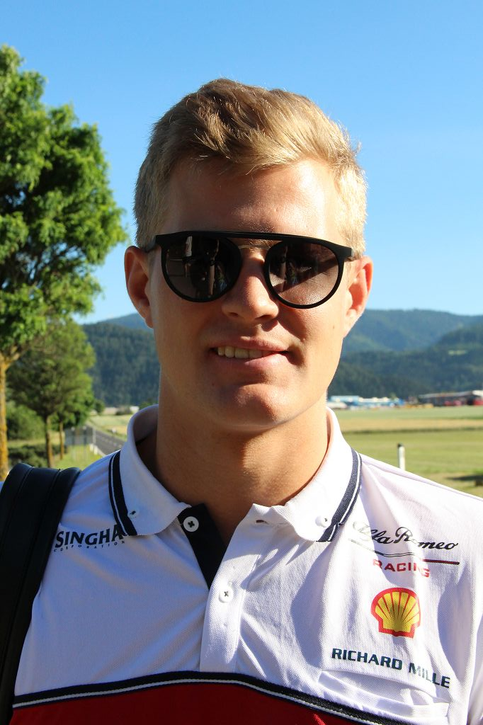 Formula 1 2019 / Schloss Gabelhofen